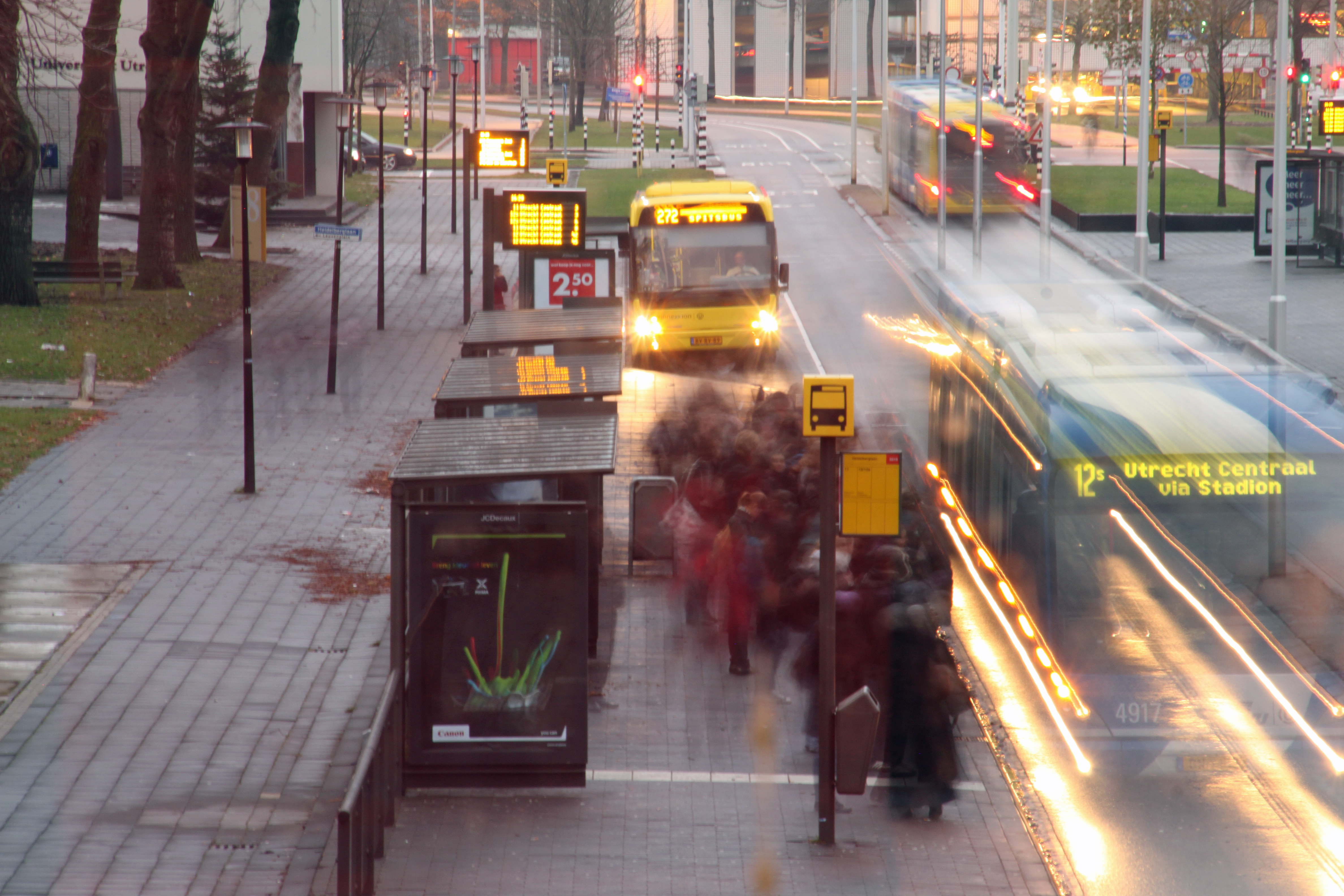 Busverkeer in de avondspits op De Uithof.